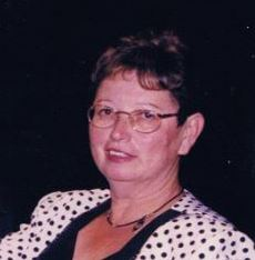 מיה קוך הייתה לוחמת בשחיתות. מייסדת עמותת עוגן, זוכת אות אביר איכות השלטון של התנועה למען איכות השלטון.